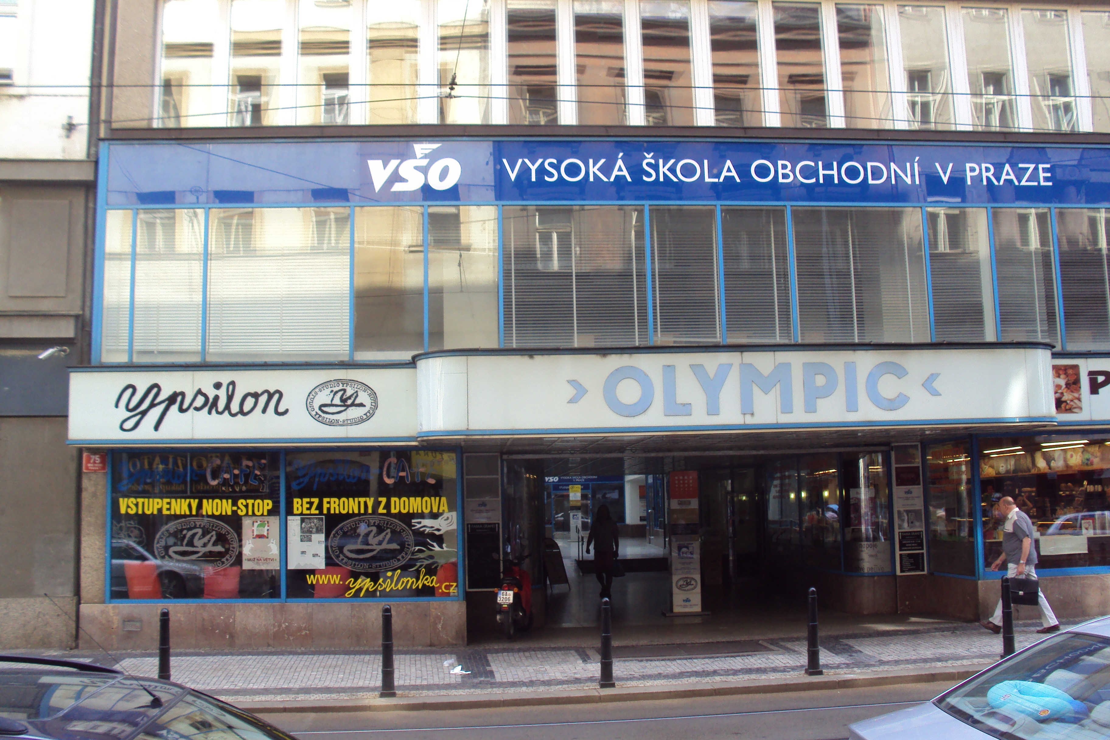 Pasáž Olympic, divadlo Ypsilon, soukromá Vysoká škola obchodní, to vše Spálená ulice 14 a 16.